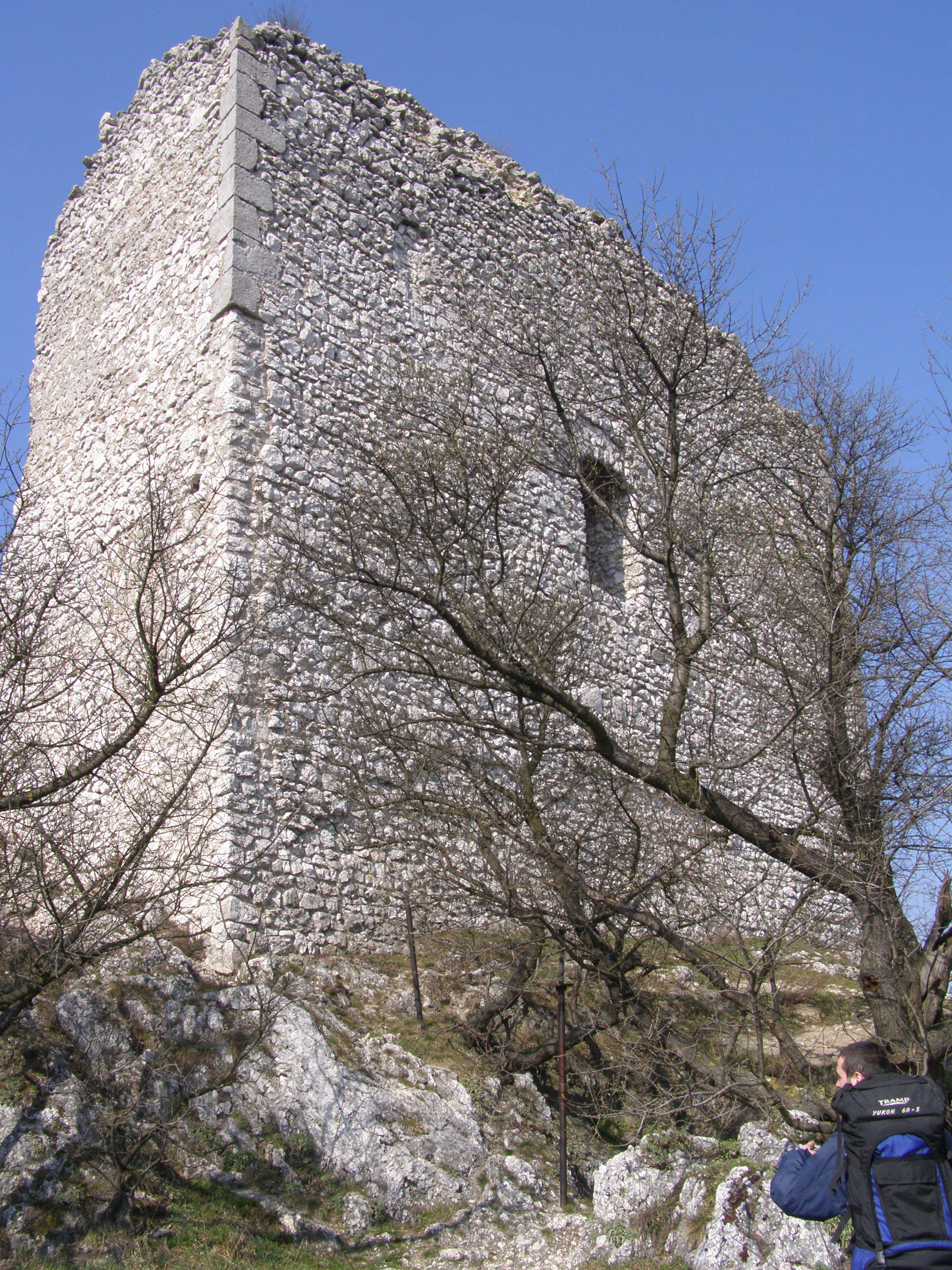 Pavlovské vrchy: Sirotčí Hrádek, východní stěna, k otvoru ve zdi vedl přístavek a sloužil jako vstup